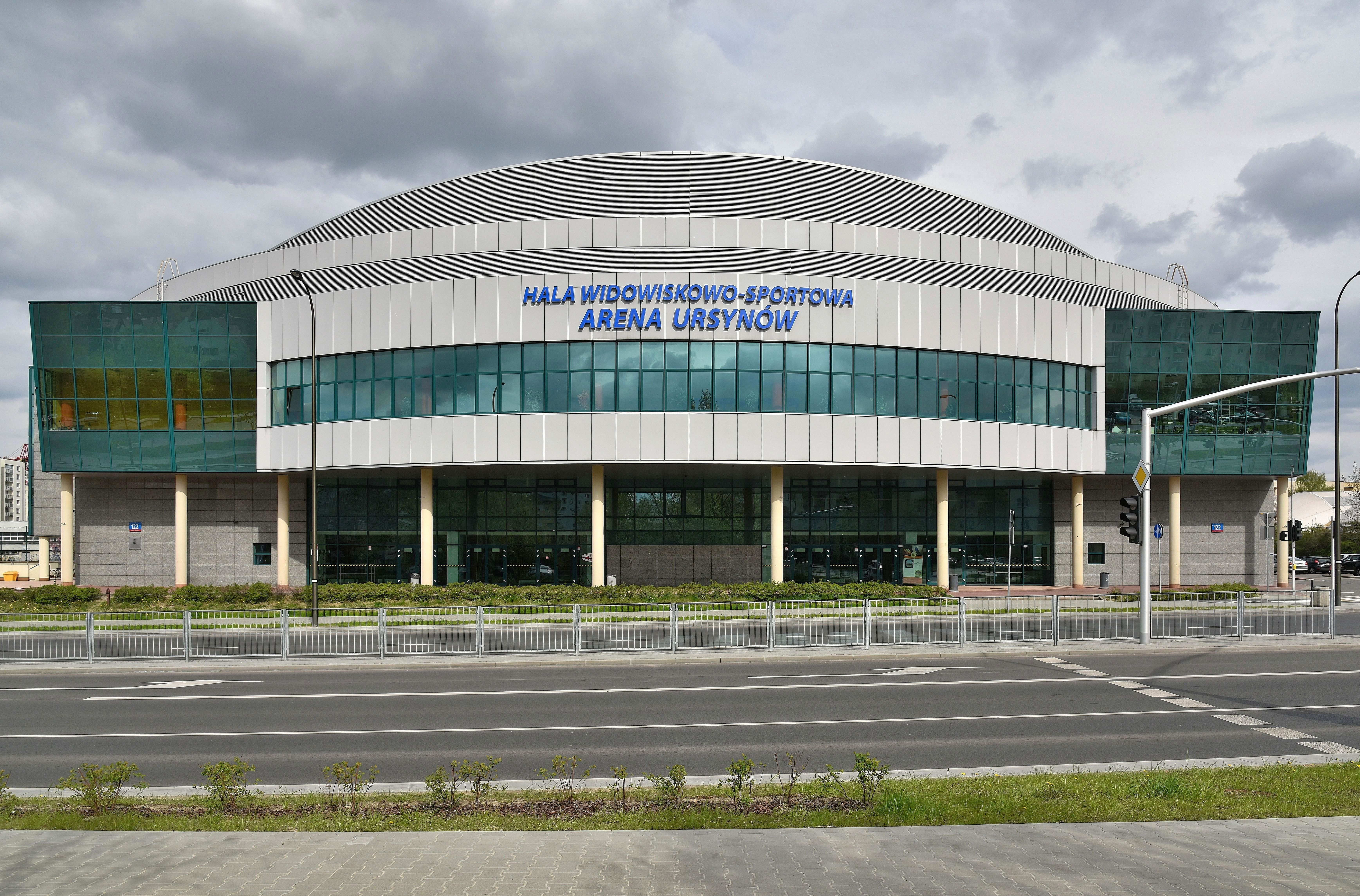 Arena Ursynów